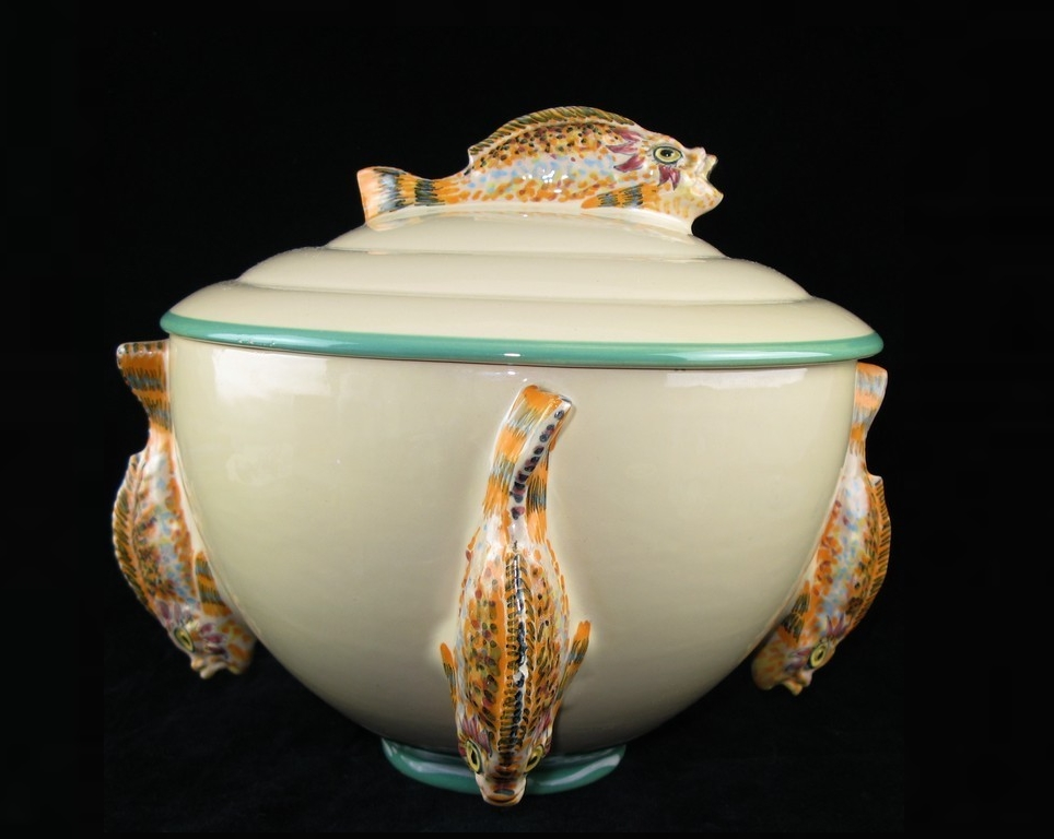 Soupière en faïence de Quimper, signée E. Laget, Manufacture Henriot, France